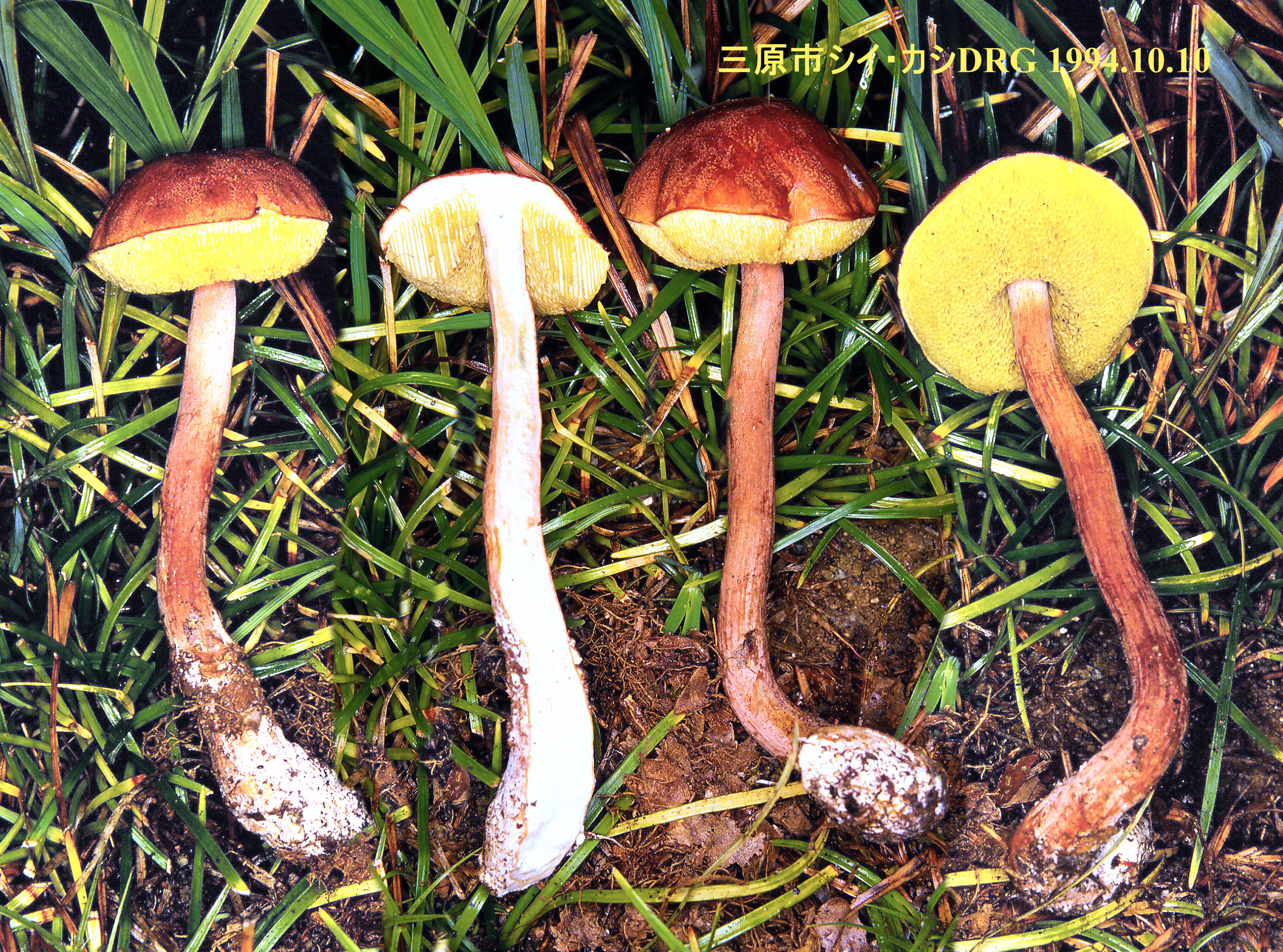 アシナガイグチ Ashi-naga-iguchi Boletelus elatus Bolet à pied élancé, Japon